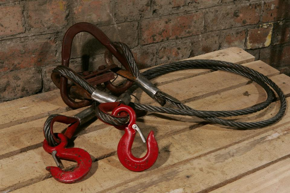 Съемные-грузозахватные приспособлений ООО "Севзапканат"